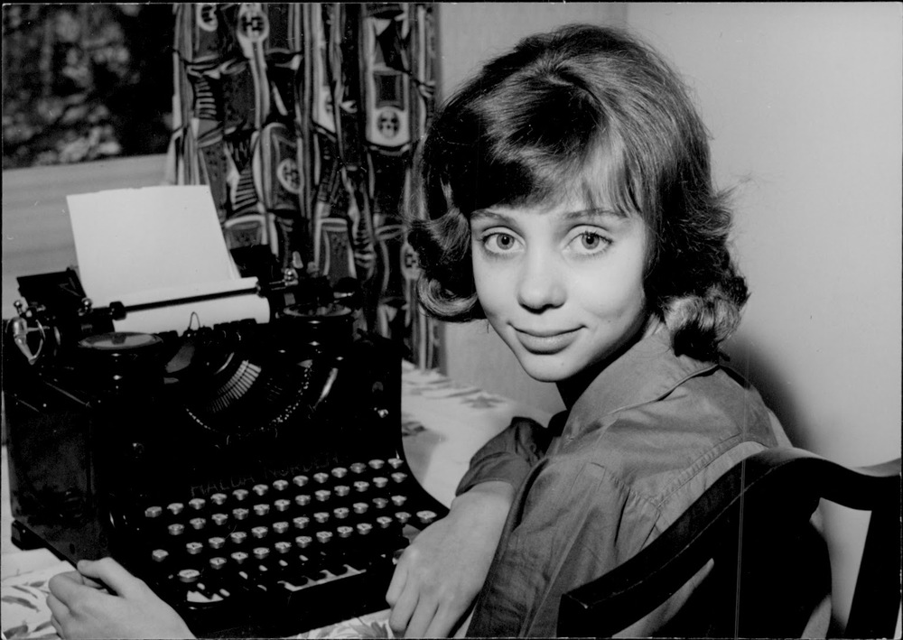 Ylva Nilsson, gift Eggehorn.